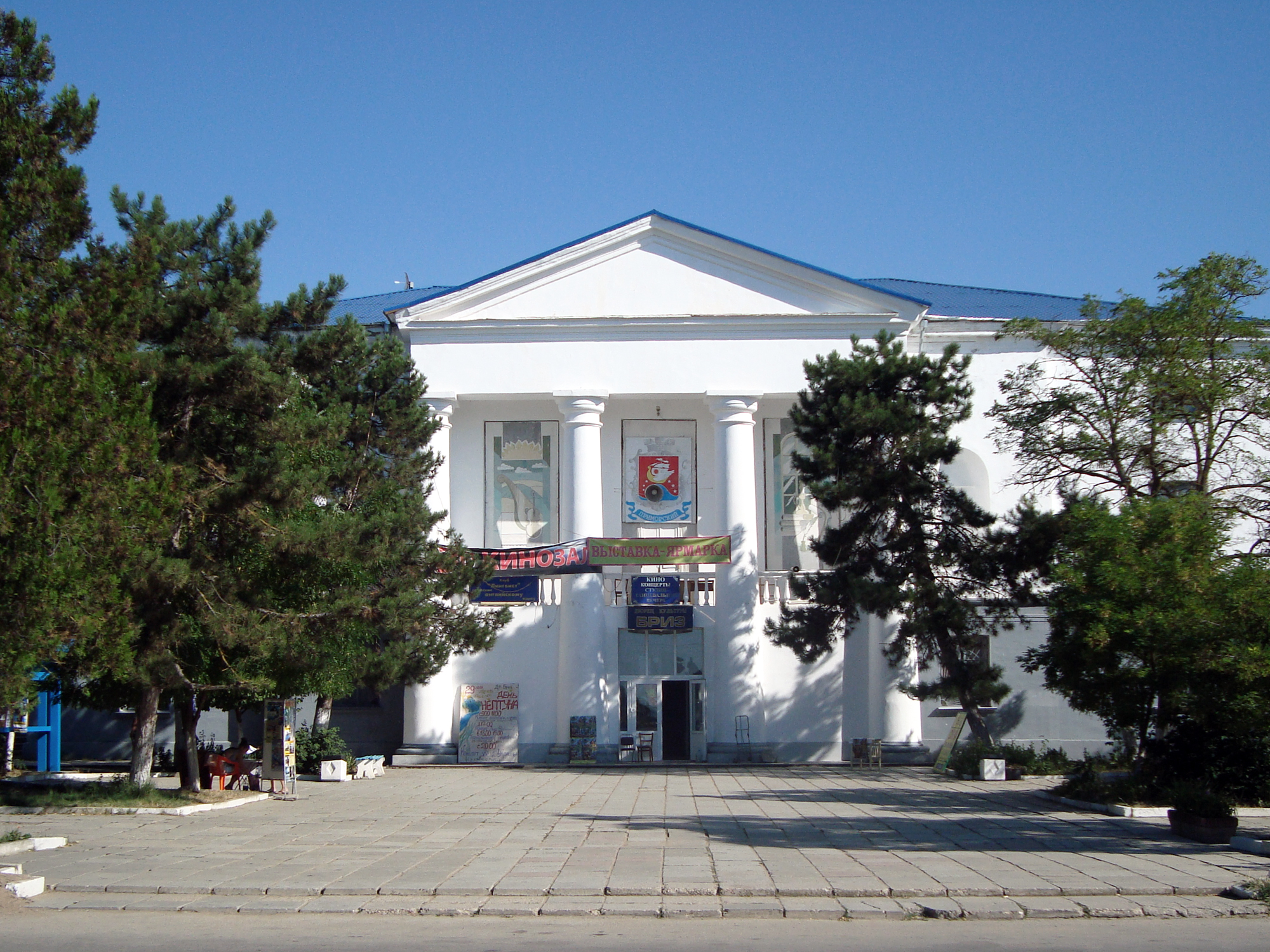 Вхід до Палацу культури «Бриз» Місцезнаходження: Крим, пгт. Приморський